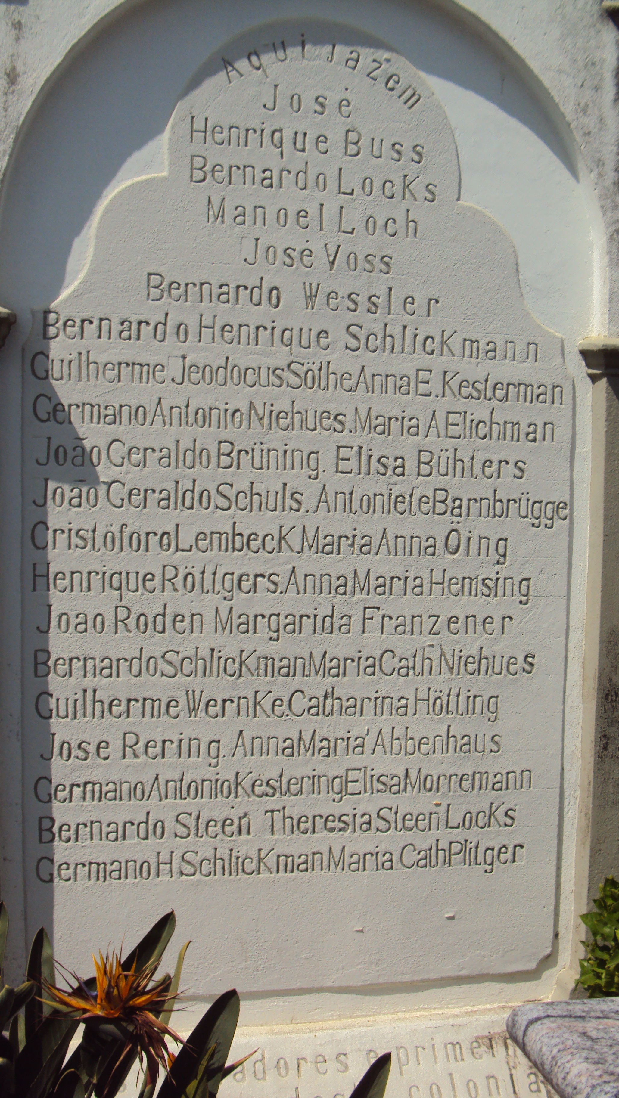 Sepultura coletiva dos imigrantes fundadores da colônia de Braço do Norte